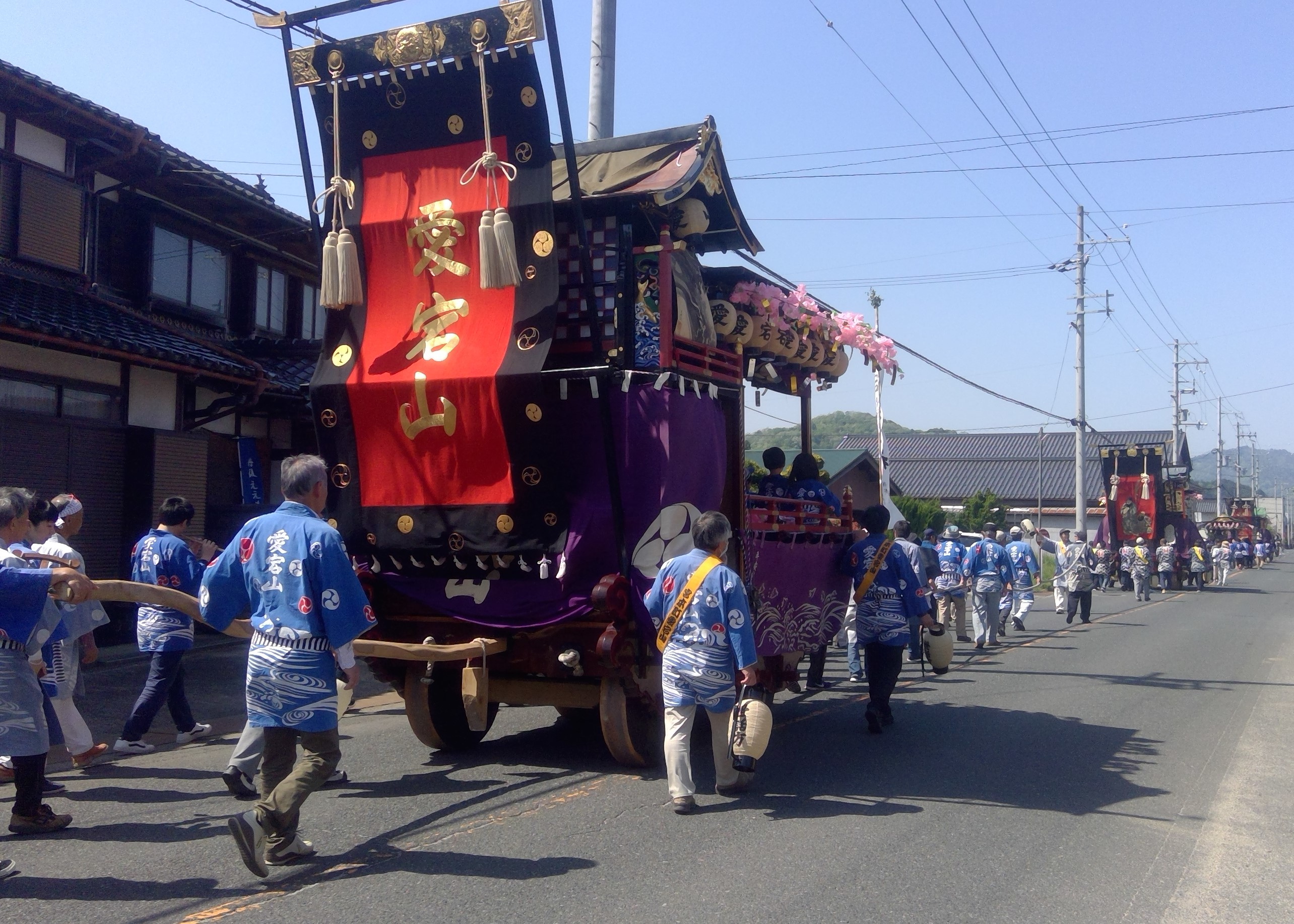 京都府与謝野町の愛宕神社の祭礼行事、加悦谷祭りの巡行